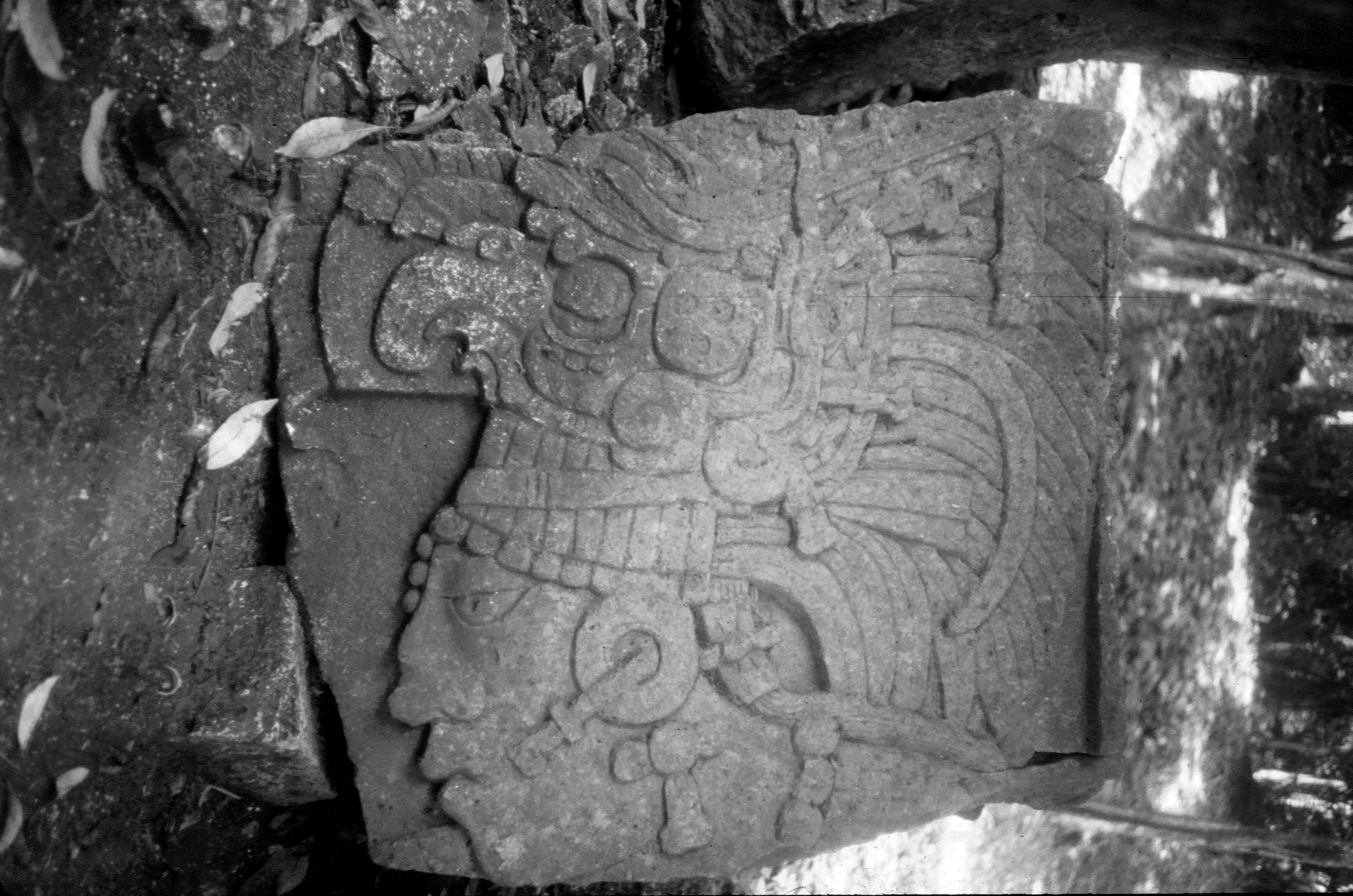 Ruler 2 (Dos PIlas)